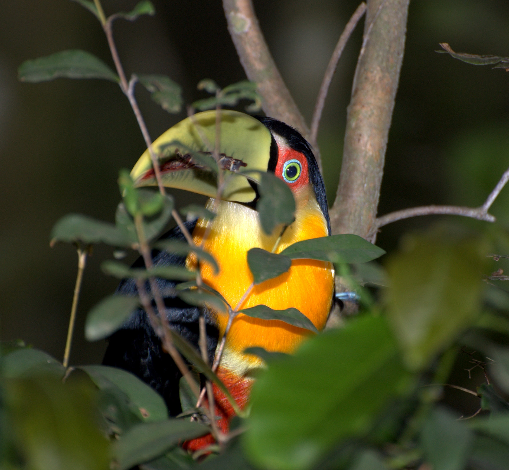 Parque Estadual da Serra da Cantareira - São Paulo-SP - Brasil